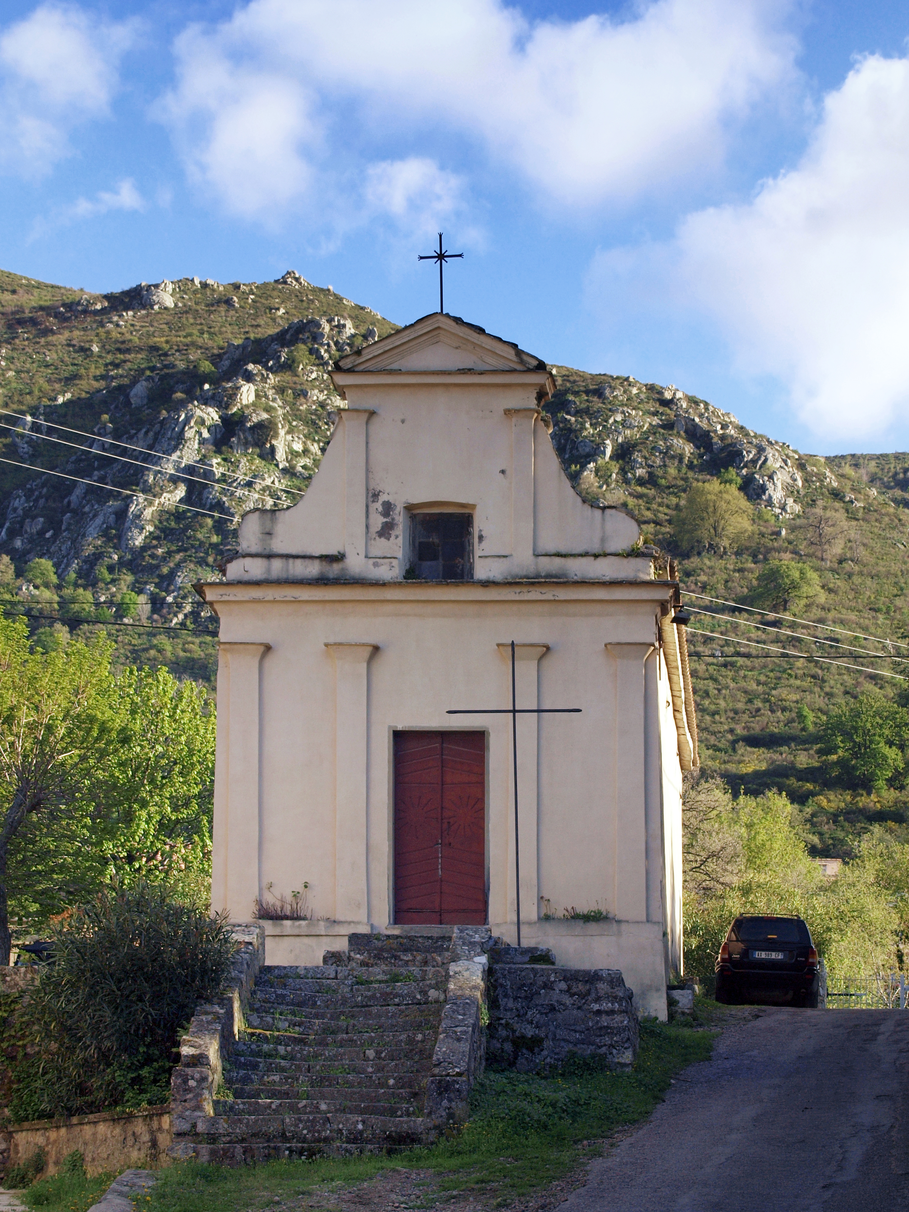 Ville-di-Paraso, Balagne (Haute-Corse) - Chapelle Saint-Roch, au quartier San Roccu.